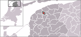 Locatie van Stiens aangegeven binnen de voormalige gemeente Leeuwarderadeel.